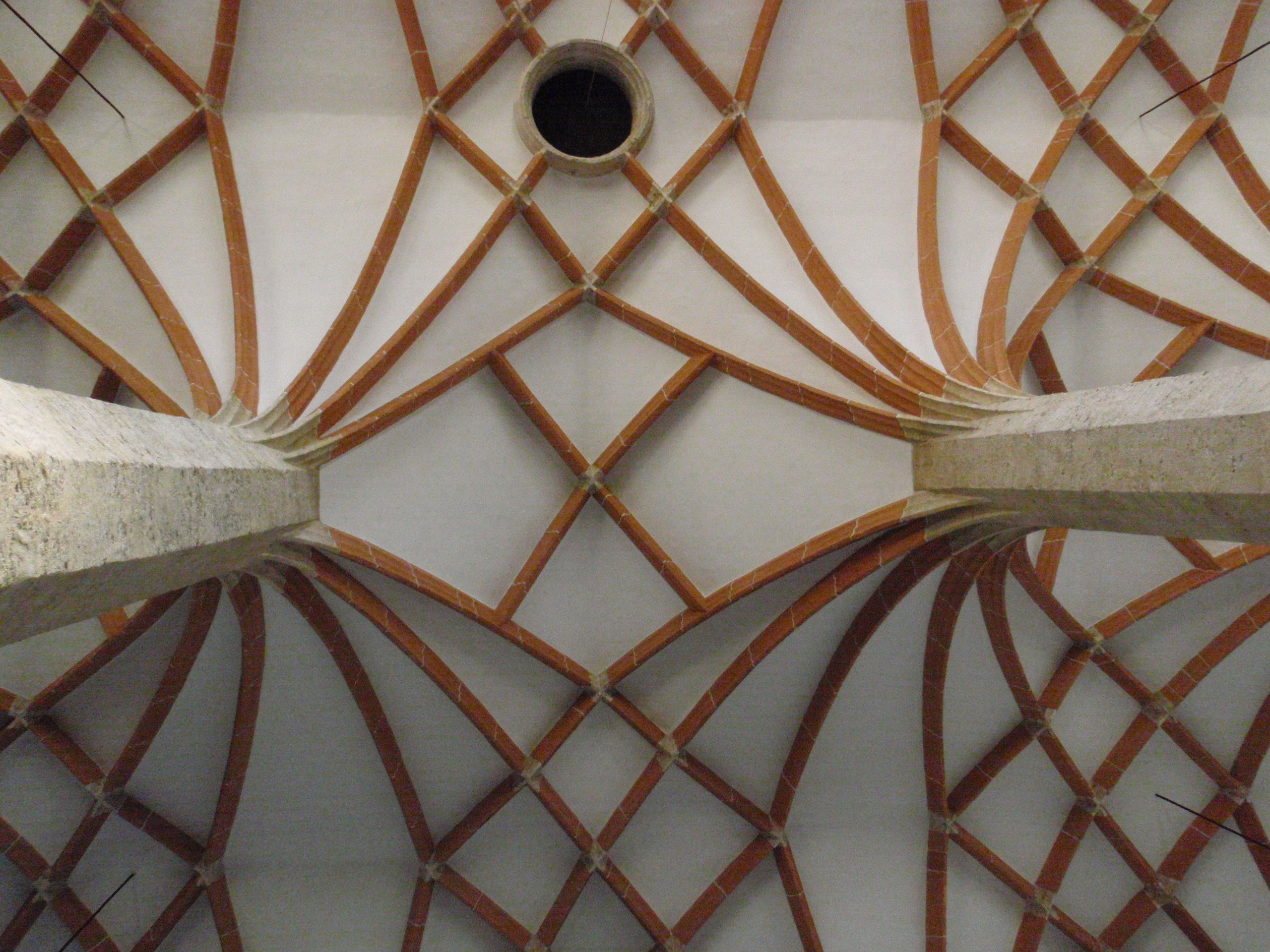 Pfarrkirche St. Oswald-Möderbrugg - Kreuzrippengewölbe 1